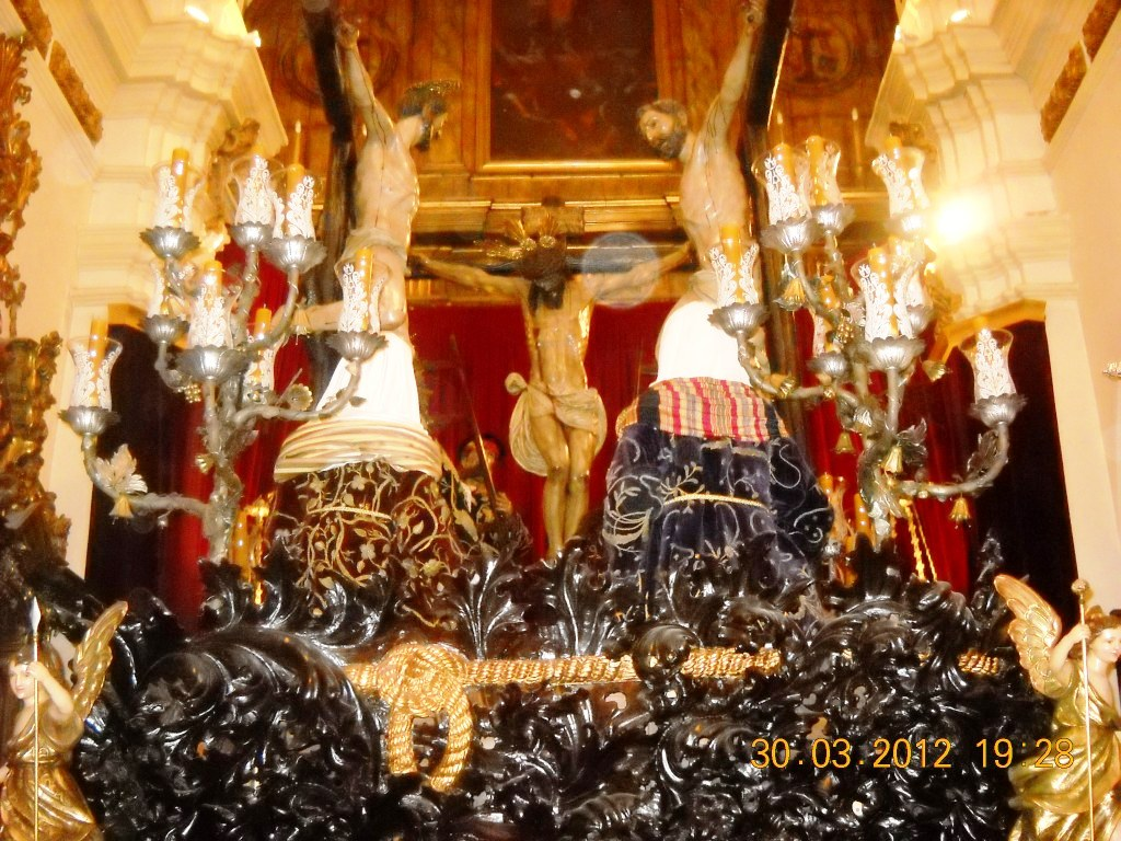 Paso del Misterio de las Tres Necesidades